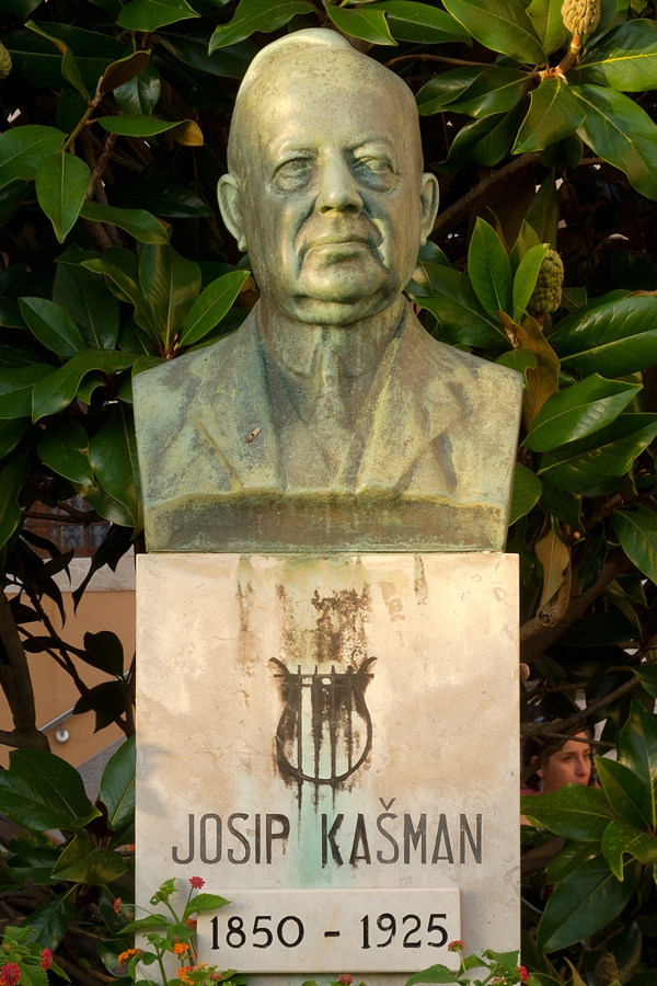 Josip Kašman